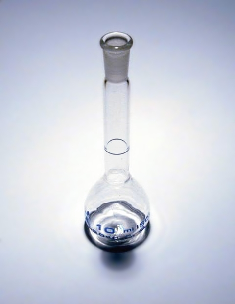 Matraz aforado de pyrex de 10 ml de capacidad.